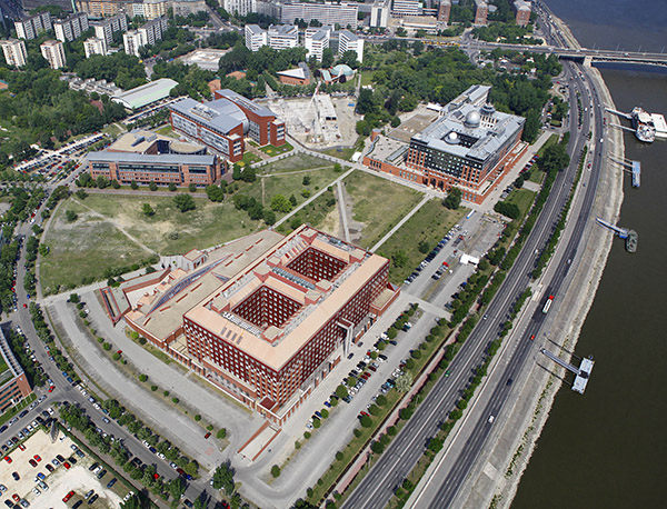 A Budapesti Műszaki Egyetem és az Elte lágymányosi campusa valamint ezek környéke pl a Magyar Tudományos Akadémia Természettudományi Kutatóközpont a Magyar Szentek temploma stb.